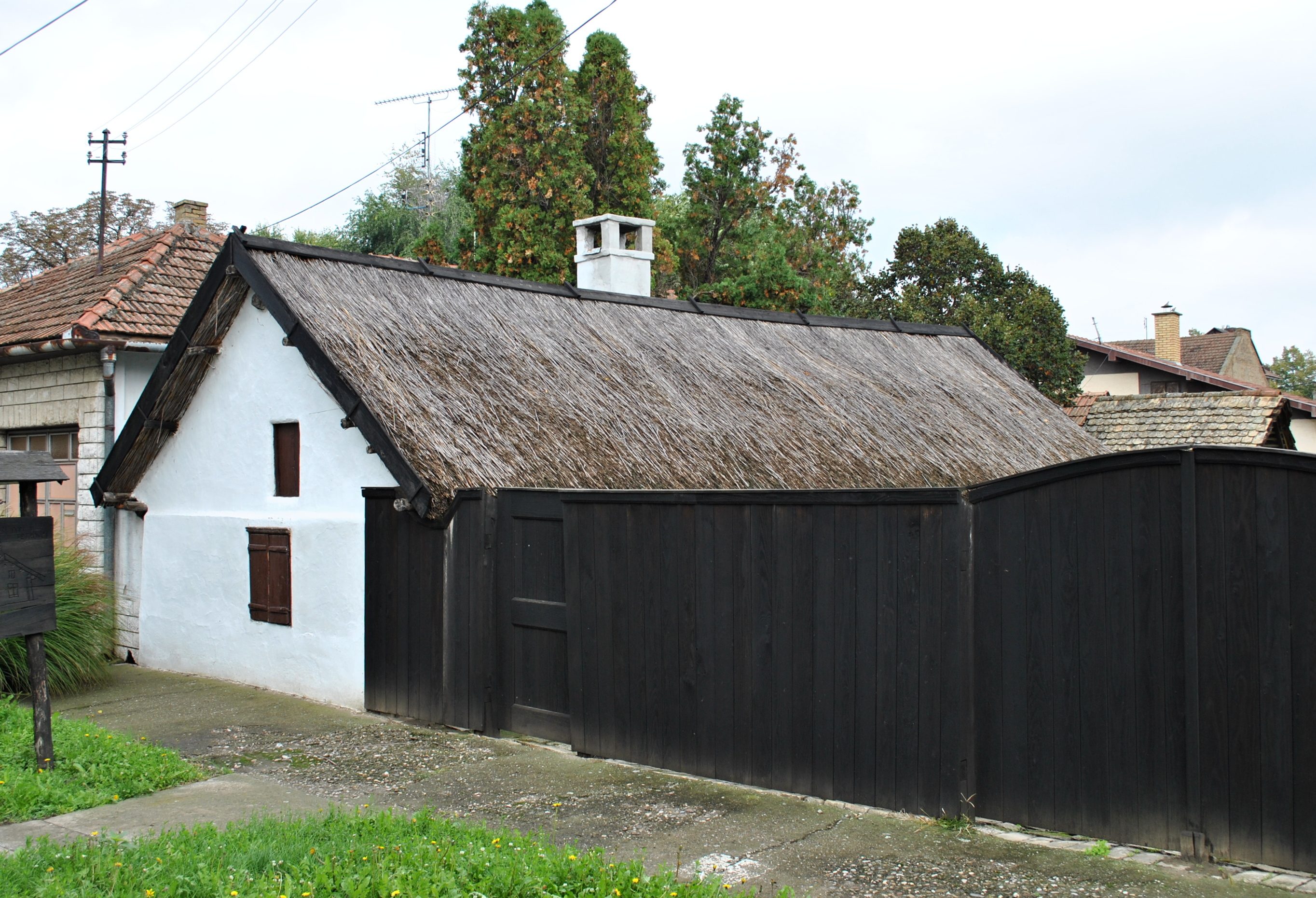 Bački Petrovac, Serbia - The oldest house in town